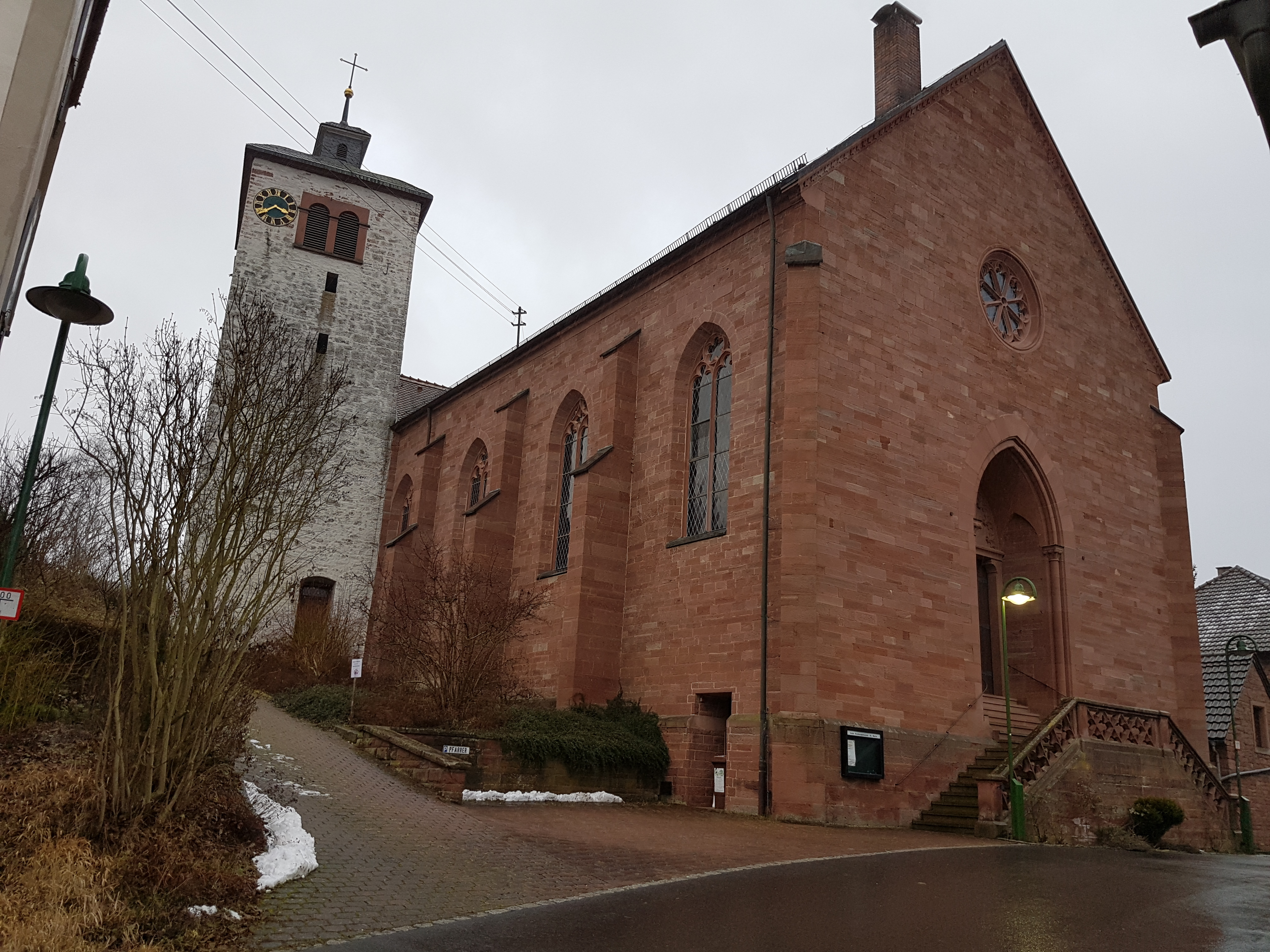 St. Maria Wenkheim bei Werbach im Main-Tauber-Kreis